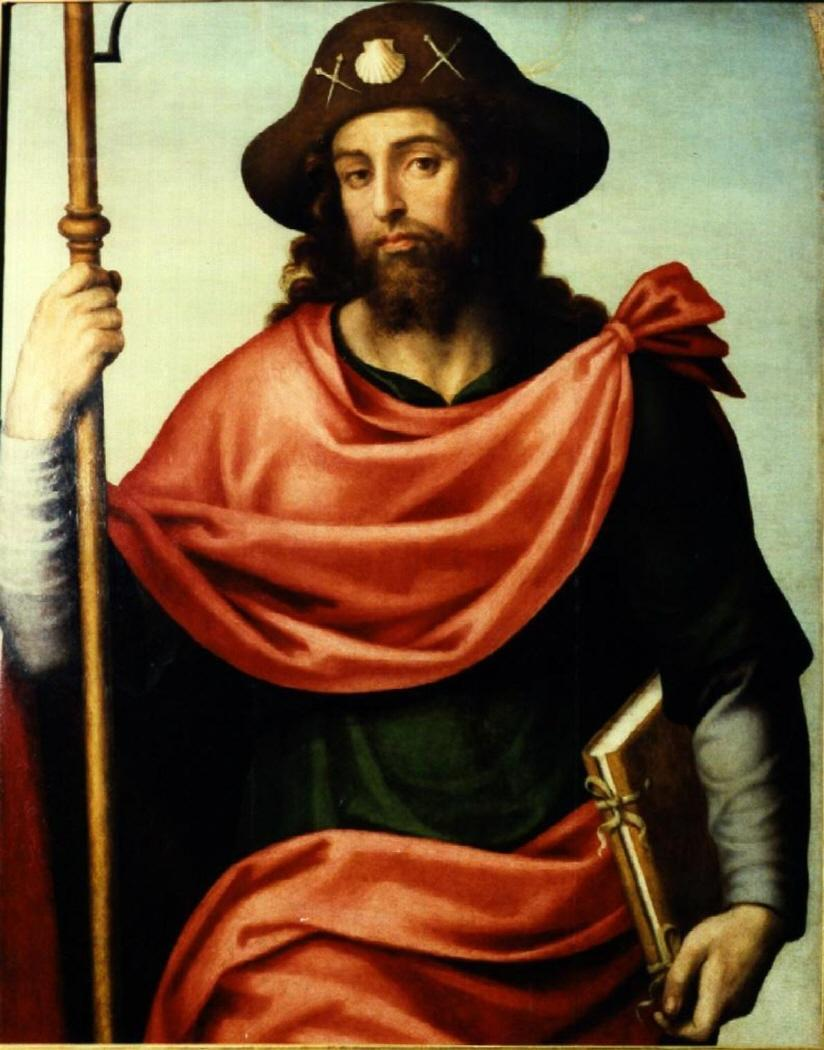 La obra representa al apóstol Santiago el Mayor, que fue uno de los doce apóstoles de Jesucristo, con los atributos de peregrino compostelano.